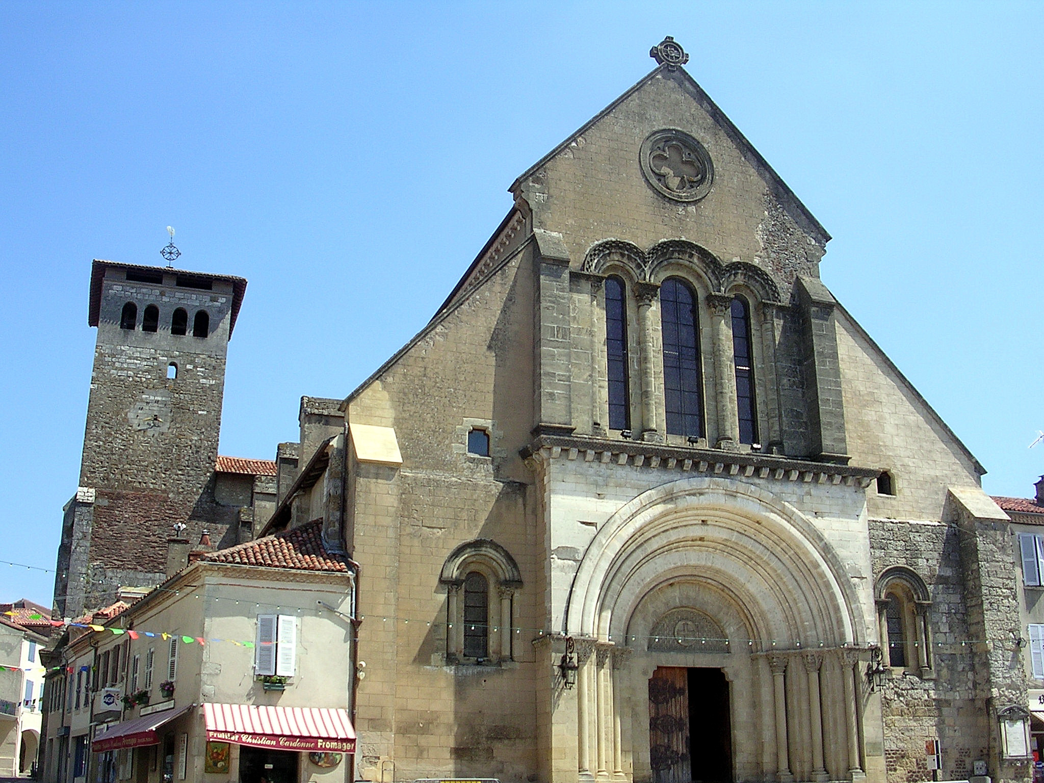 Abbaye bénédictine de Saint-Sever, dans les Landes (France)